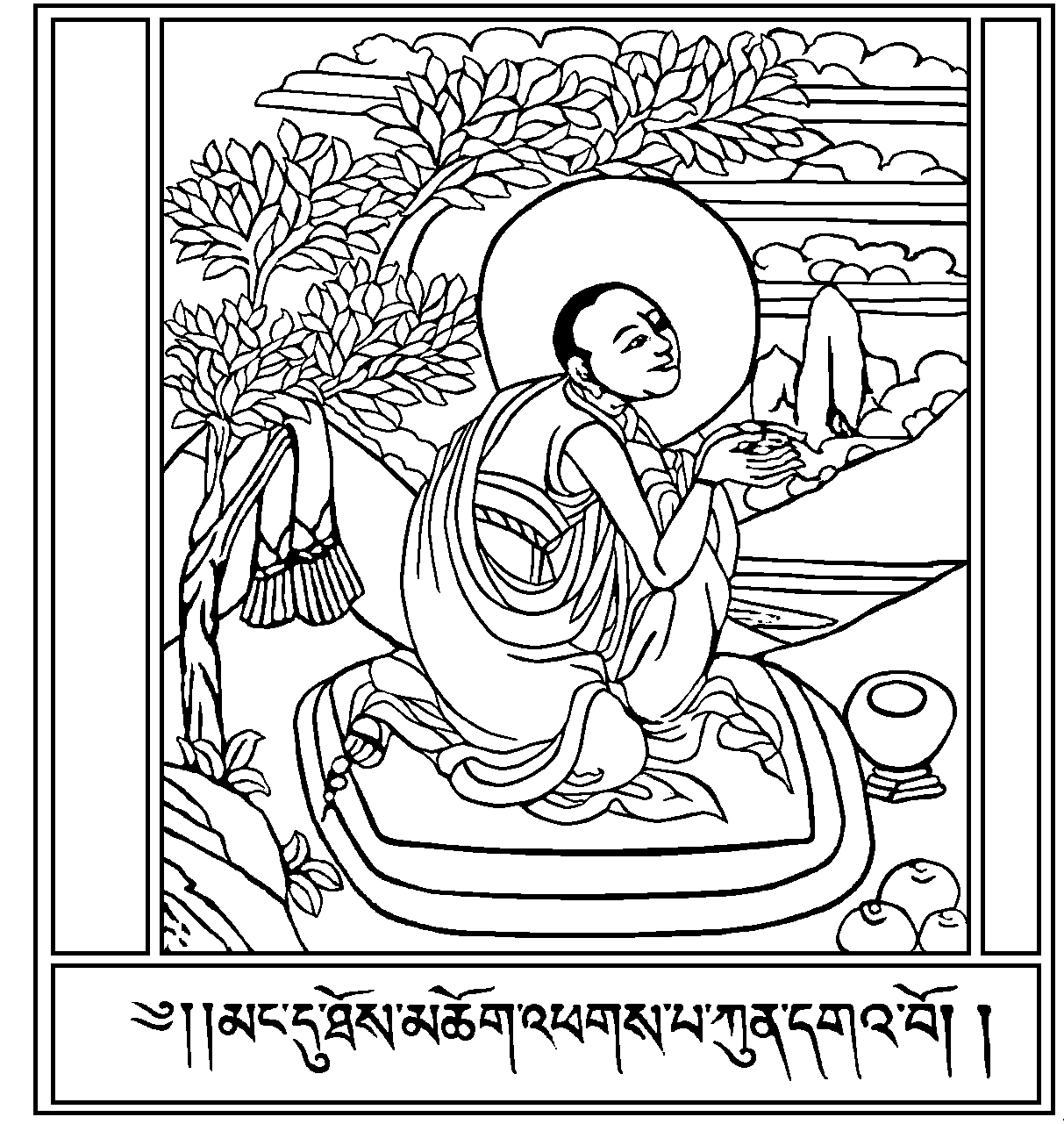 Hình được phép công bố của trang vi: ACIP Thể loại:Đồ tượng Phật giáo